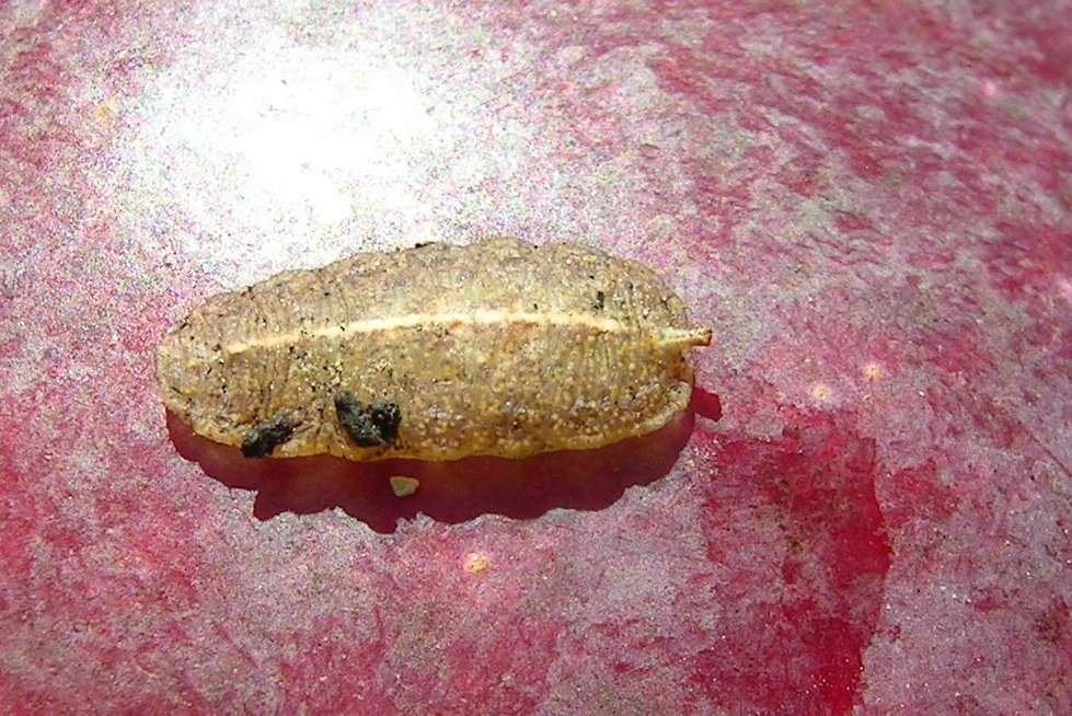 (en) Flower-fly (on an apple) Place: Switzerland Editing: GIMP (cut) (de) Larve einer Schwebefliege (Syrphidae) auf einem Apfel Aufnahmeort: Schweiz, SG, Garten Bearbeitung: GIMP Zugeschnitten